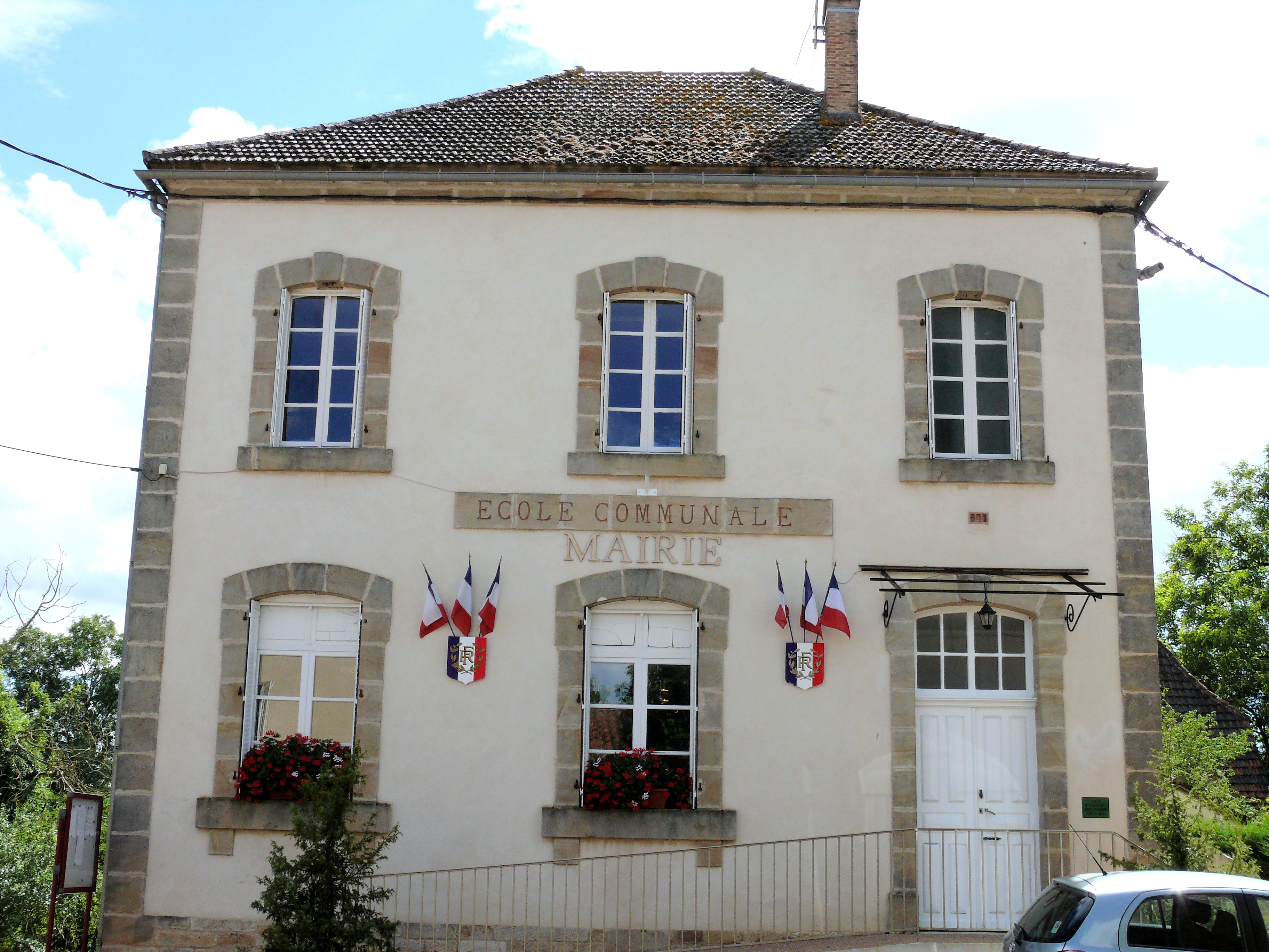 Rudelle - Mairie